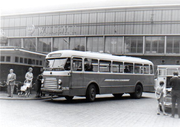 Scania-Vabis bus, bouwjaar 1956, van busbedrijf Naco. Foto gemaakt in 1965 te Haarlem, Kennemerplein.